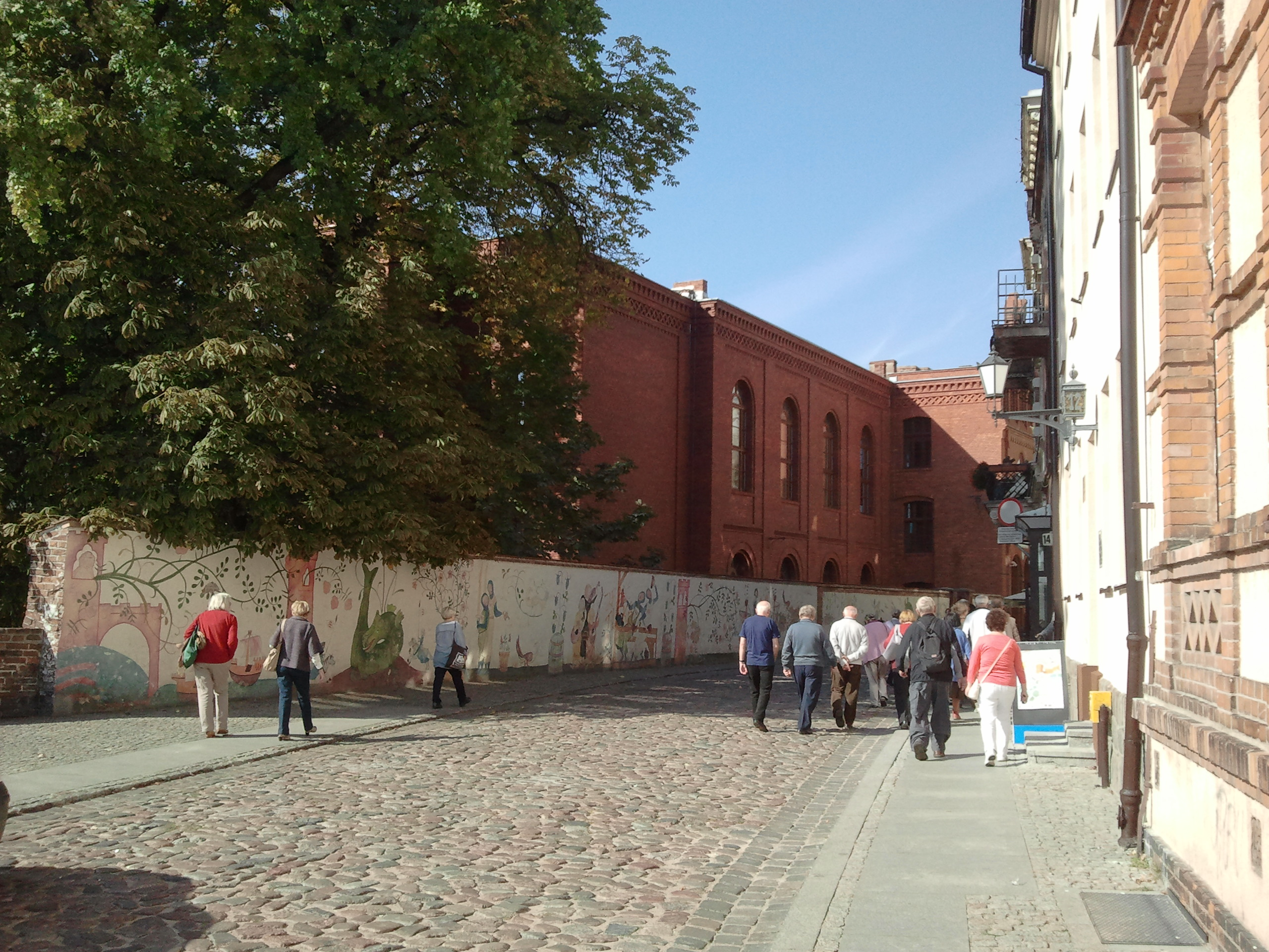 Toruń, ul. Przedzamcze 13-15 - dom Bractwa Strzeleckiego, obecnie Młodzieżowy Dom Kultury, 1892-93 (zabytek nr A/679)